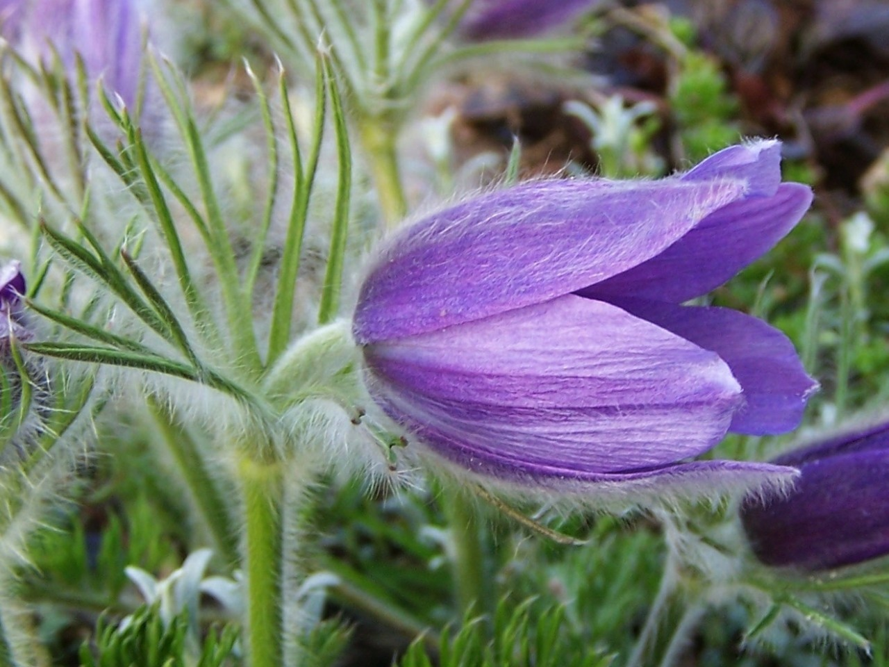 Pulsatilla vulgaris